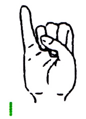 Buchstabe I im deutschen Fingeralphabet, gemäß einer Infokarte der Deutschen Gehörlosenhilfe Bayern e.V